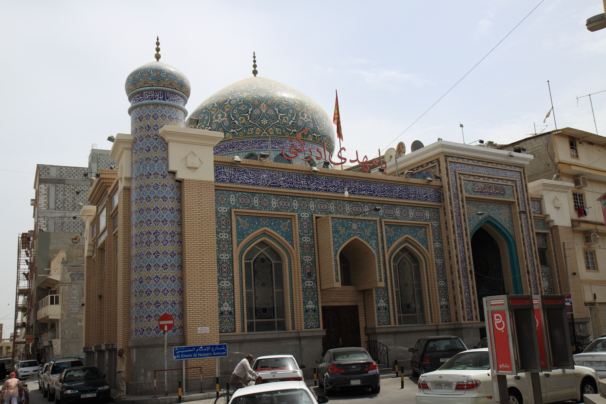 Matam Ajam Al-Kabeer in Manama, Bahrain.